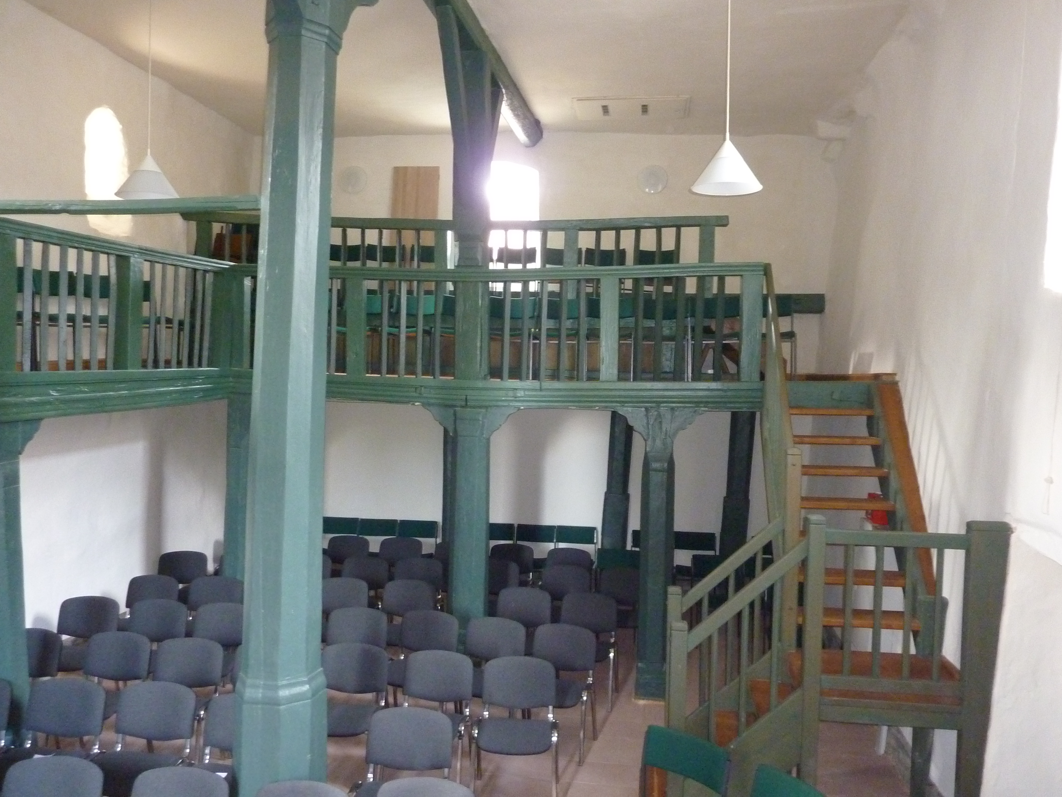 Emporen